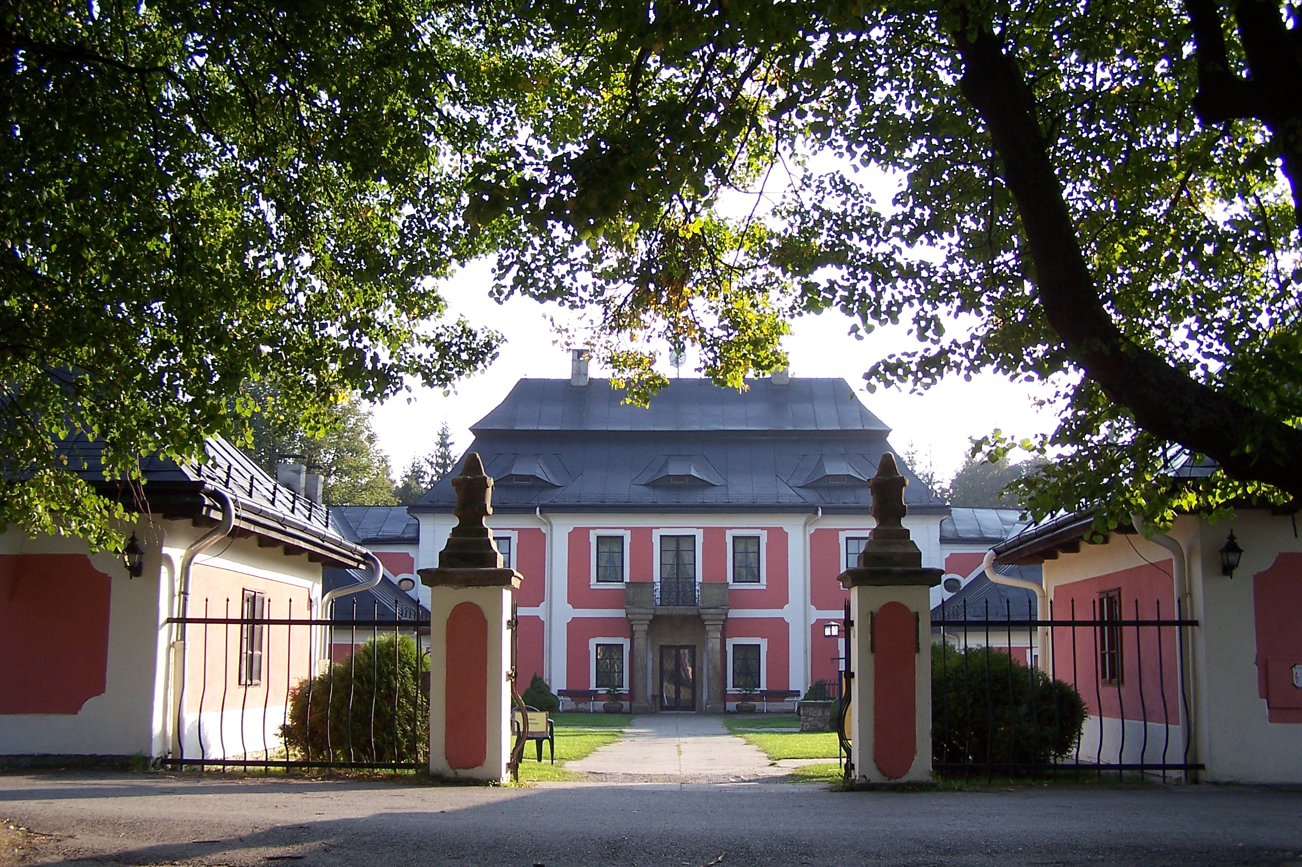 Zámek Karlštejn, nacházející se na území obce Svratouch. Lovecký zámek Karlštejn si nechal postavit v letech 1767–1776 majitel rychmburského panství Filip Kinský. U zámku bývala obora. Do areálu zámku je zastavěná kaple sv.Jiljí, která zde stála dřív než zámek, oltář v kapli byl podle záznamů posvěcen 20.9.1708 opatem hradišťského kláštera.